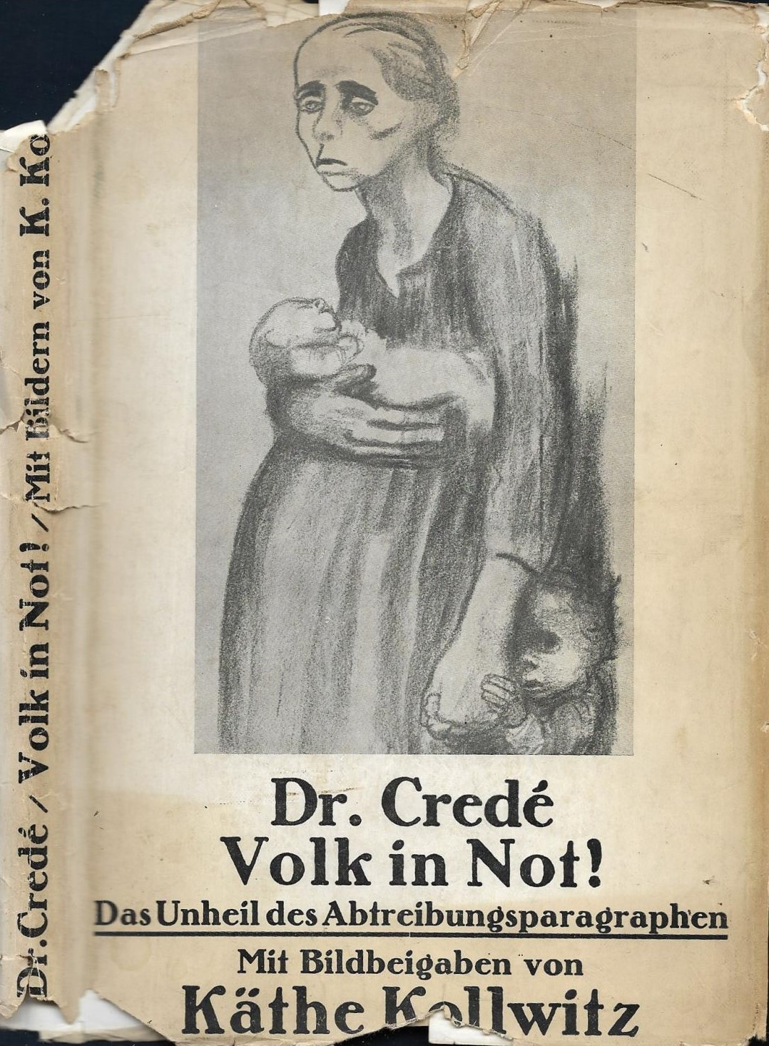 Carl Credé (1878–1952): Volk in Not! Das Unheil des Abtreibungsparagraphen (§ 218). Carl Reissner Verlag, Dresden 1927 (mit 16 Schöpfungen [Tafeln] von Käthe Kollwitz)